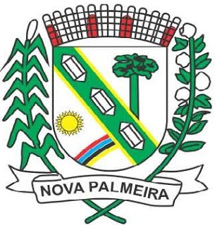 Brasão de Armas do Município de Nova Palmeira no Estado da Paraíba, Brasil.